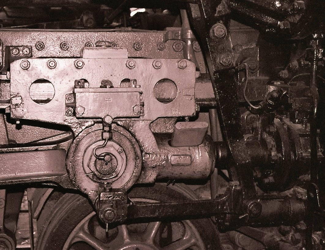 Querkeilverbindung an einer Dampflokomtive